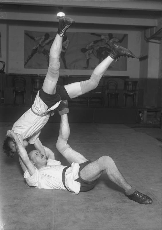 Jiu-Jitsu, die moderne Verteidigungswaffe bei Ueberfällen ! Eine Trainingsstunde in der bekannten Jiu-Jitsu-Schule des Meisters der japanischen Verteidignungskunst Erich Rahn. Der Ueberwurf, eine Uebung, bei welcher der auf dem Erdboden liegende dem Angreifer abwehren kann. Am Boden liegend der Meister Erich Rahn.